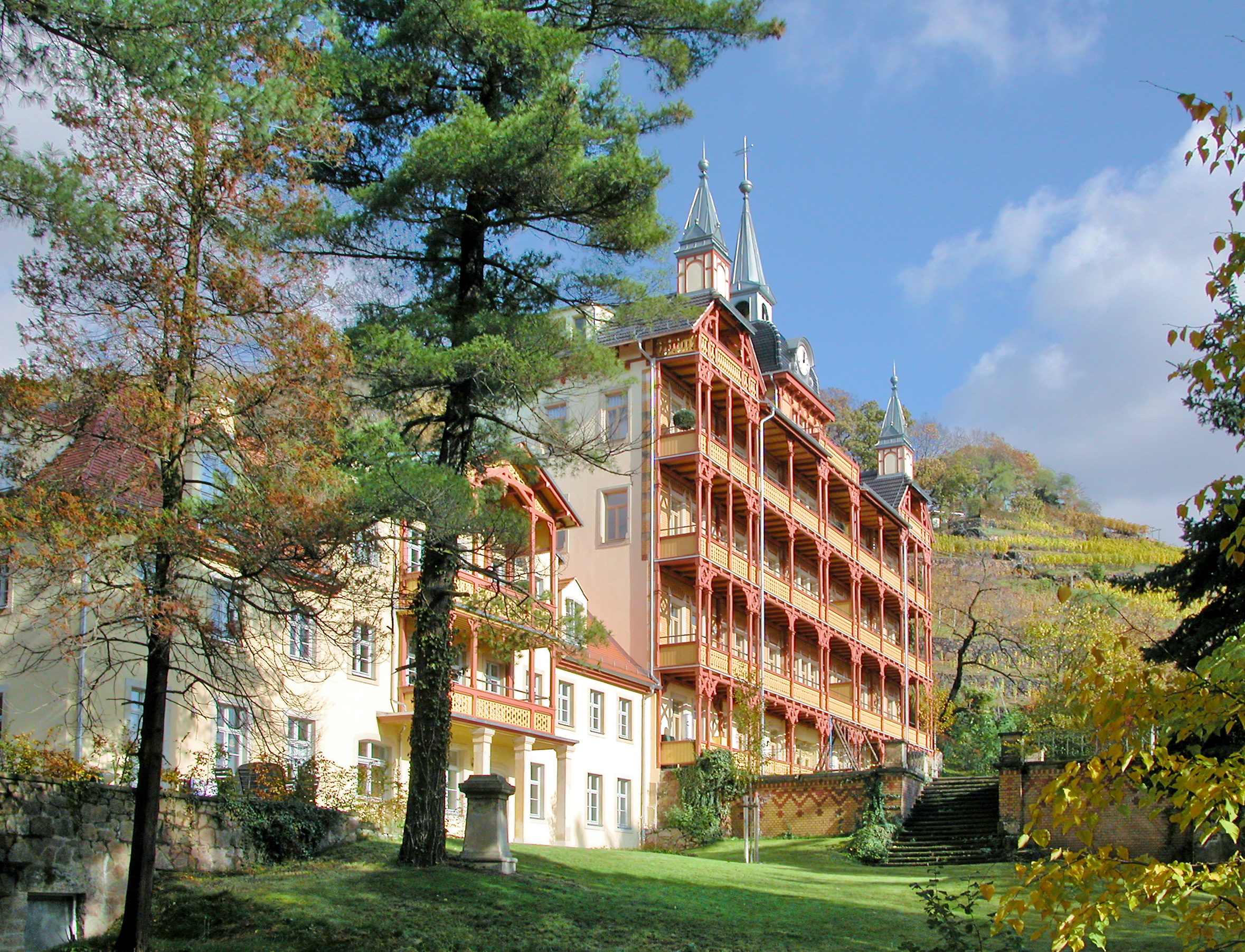 23.10.2008 01445 Radebeul: Ehem. Bilz Sanatorium, Schloß Lößnitz, Eduard-Bilz-Str. 53 (ehem. Strakenweg 86). Erbaut 1895, 2006 zu Luxuswohnungen saniert. [DSCN34856.TIF]20081023210DR.TIF&JPG(c)Blobelt